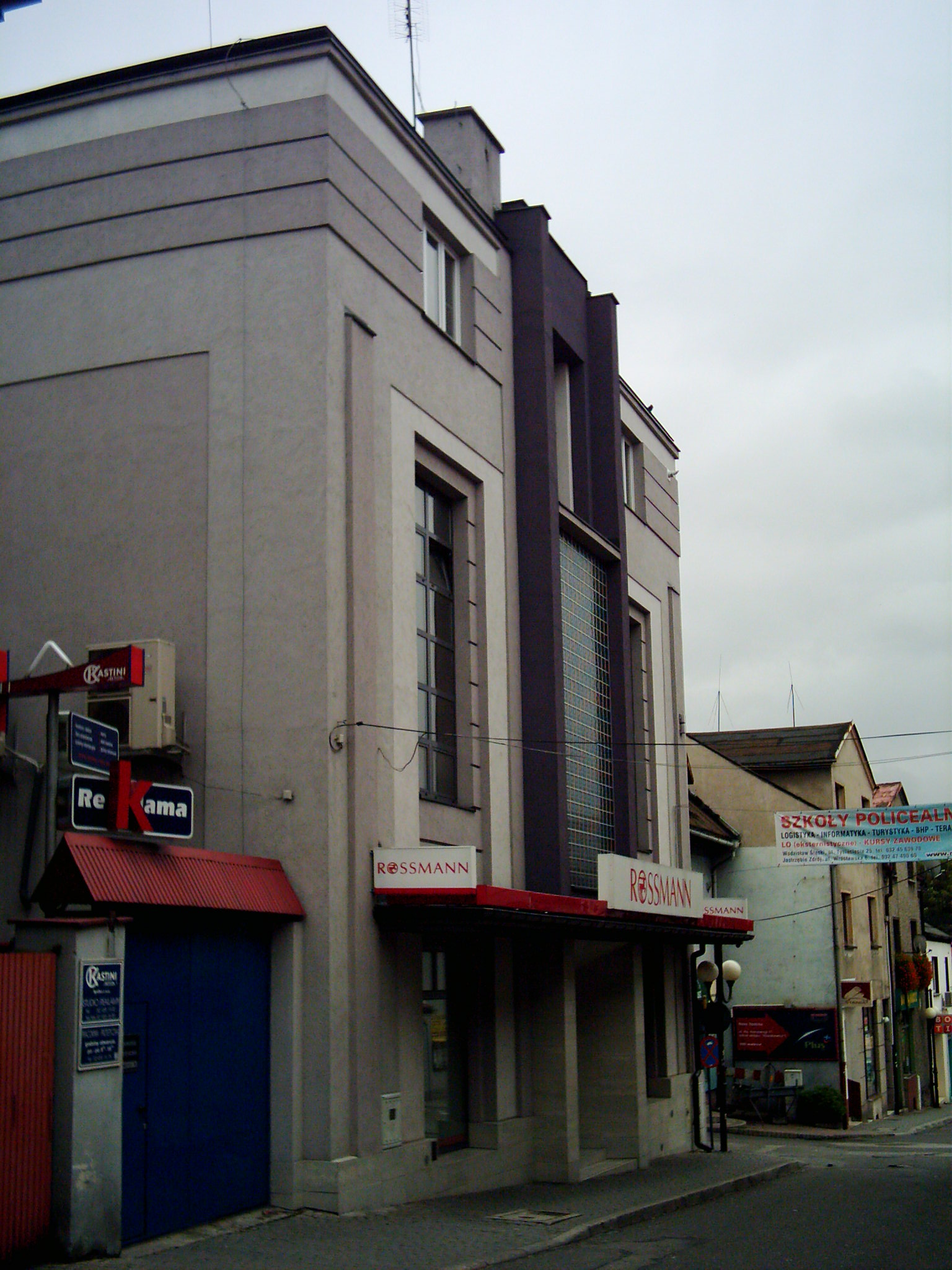 Wodzisław Śląski - Widok na dawną synagogę (obecnie sklep ROSSMAN).